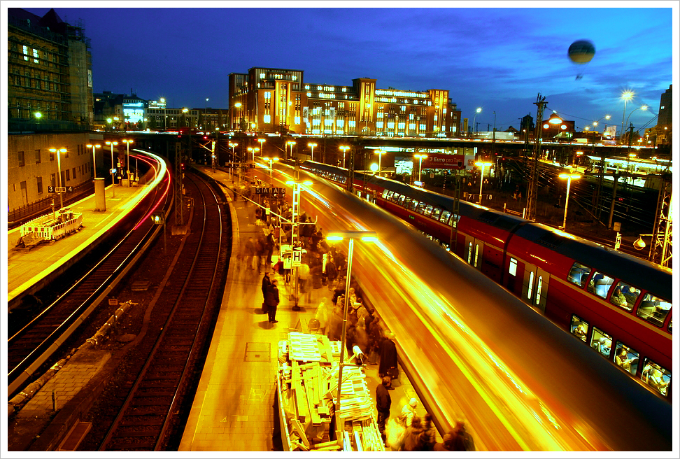 Hamburg, Deutschland 2008